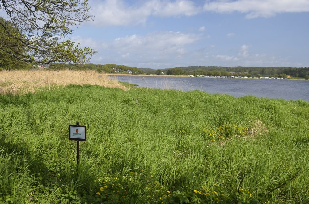 De grunne områdene i Hummerbakkfjorden er leveområde for det sjeldne dvergålegresset.